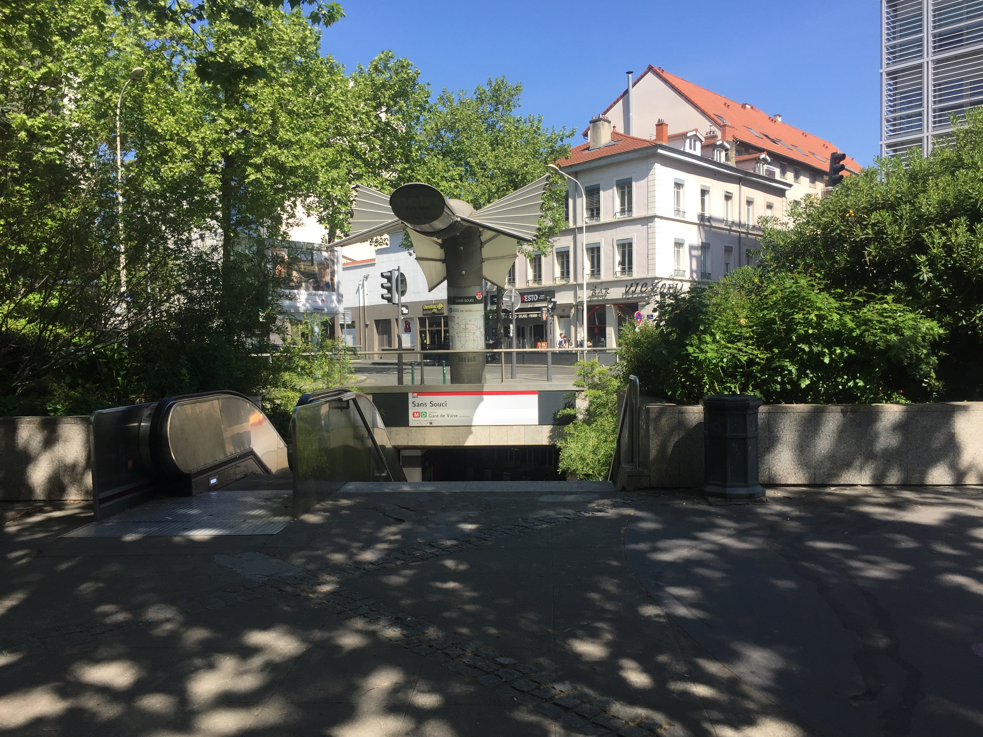 Station Sans Souci